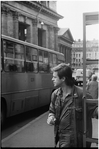 Место съёмки Ленинград, улица Плеханова близ пересечения с Невским проспектом. В левой части фото — два фрагмента северо-западного фасада Казанского собора (см. пояснения в галерее), справа — уличная будка телефона-автомата (не сохранилась). Справа на цветном фото — ближний фрагмент Казанского собора, который виден в левой части чёрно-белого фото Игоря Мухина Шестиколонный портик Казанского собора, который виден в центральной фоновой части фото Игоря Мухина «Дом Кохендерфера» (угол ул. Плеханова и проезда к каналу Грибоедова), который виден в правой фоновой части фото Игоря Мухина Справа — „Воронихинский сквер“ (в фото не попал). Автобус «Икарус» — экскурсионный. УАЗик — жёлтый, с надписью «Милиция» поверх синей полосы.